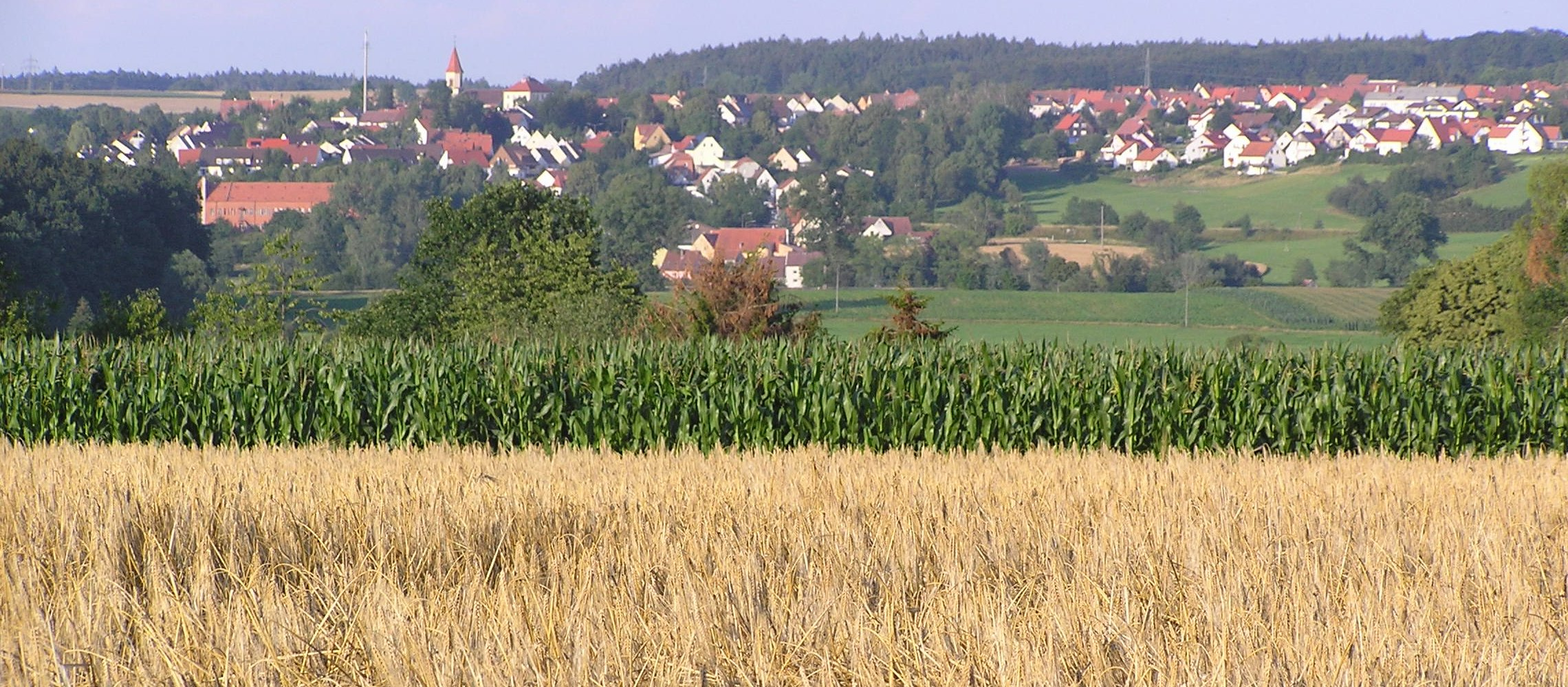 Schopfloch aus Richtung Zwernberg gesehen